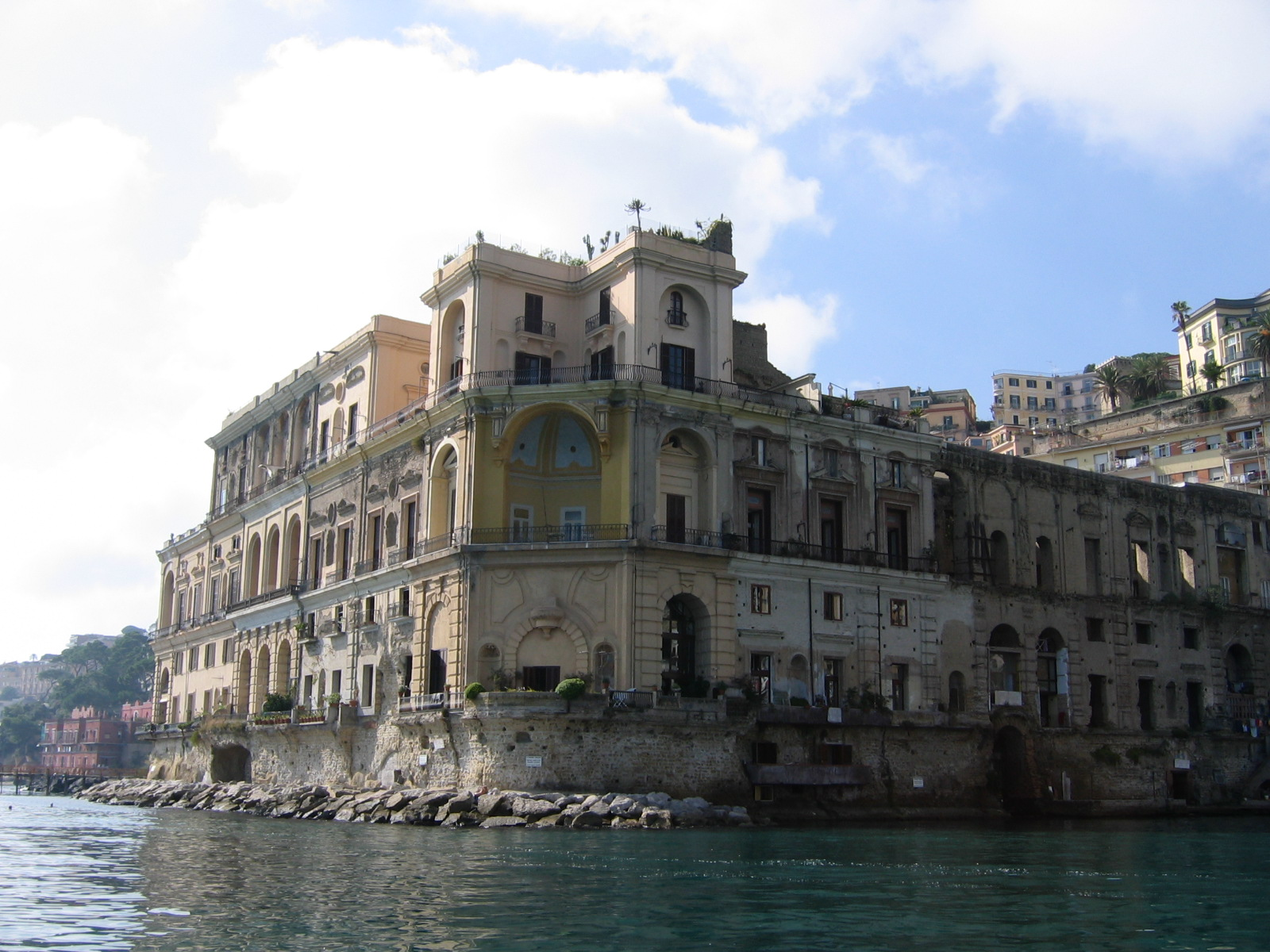 Napoli. Palazzo Donn'Anna visto dal mare. Ottobre 2004. Foto propria. Licensing Categoria:Napoli